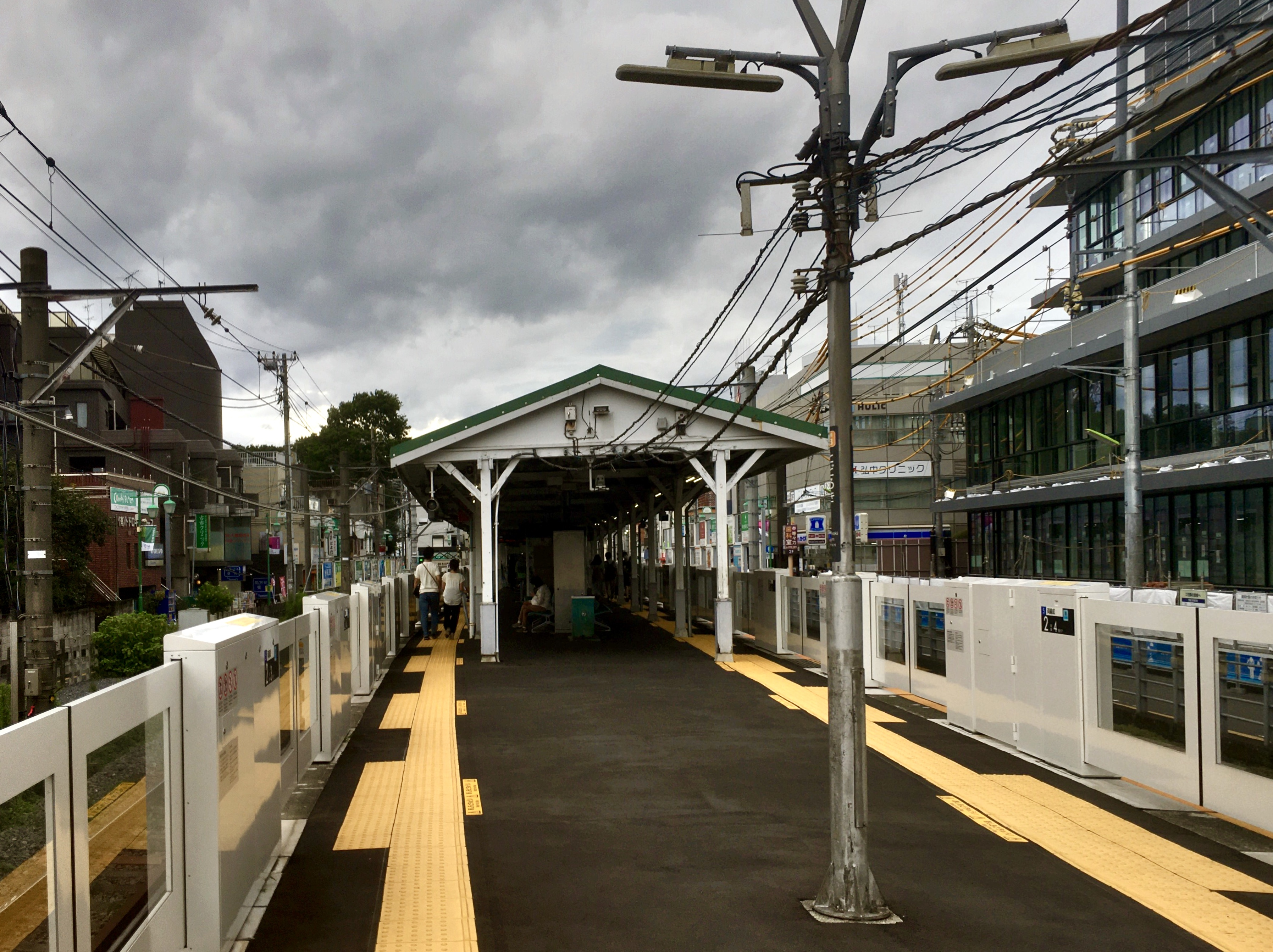 Todoroki Station (等々力駅)